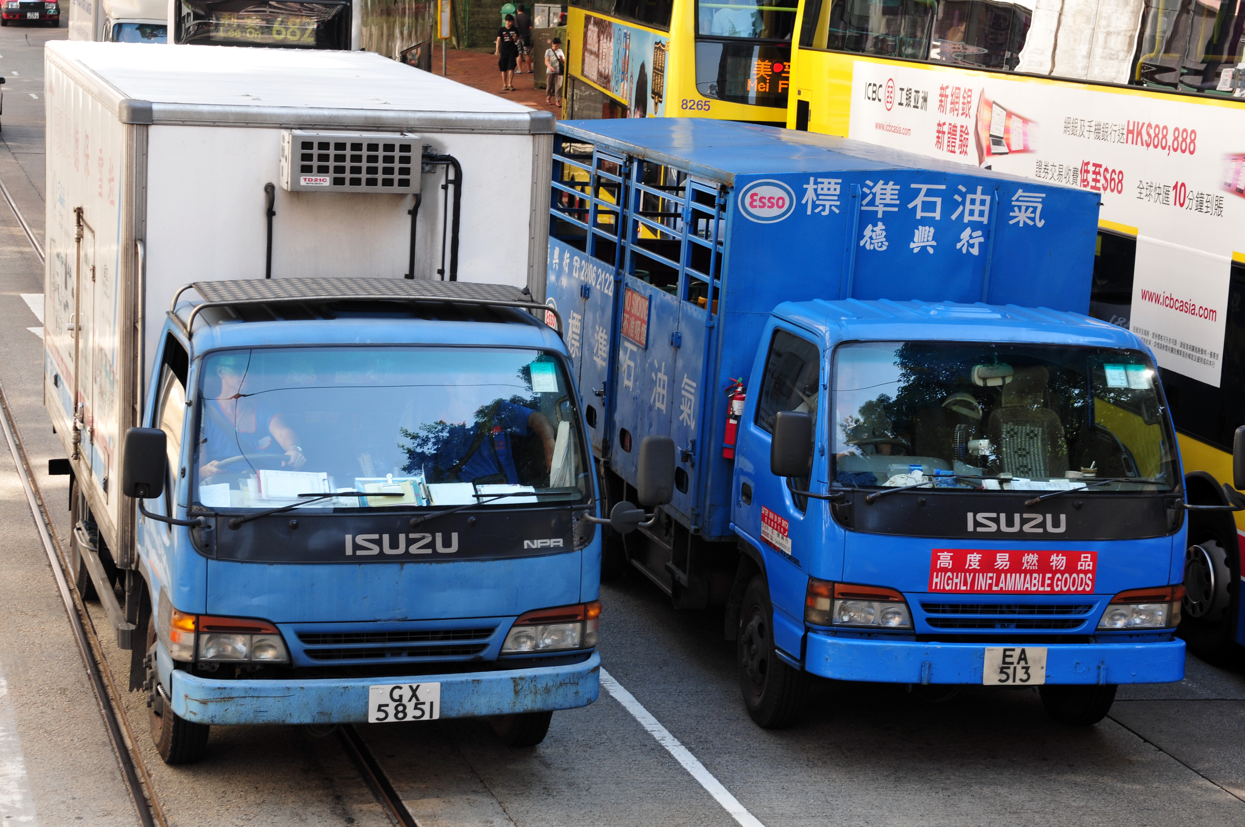 Wikimania 2013 Hongkong